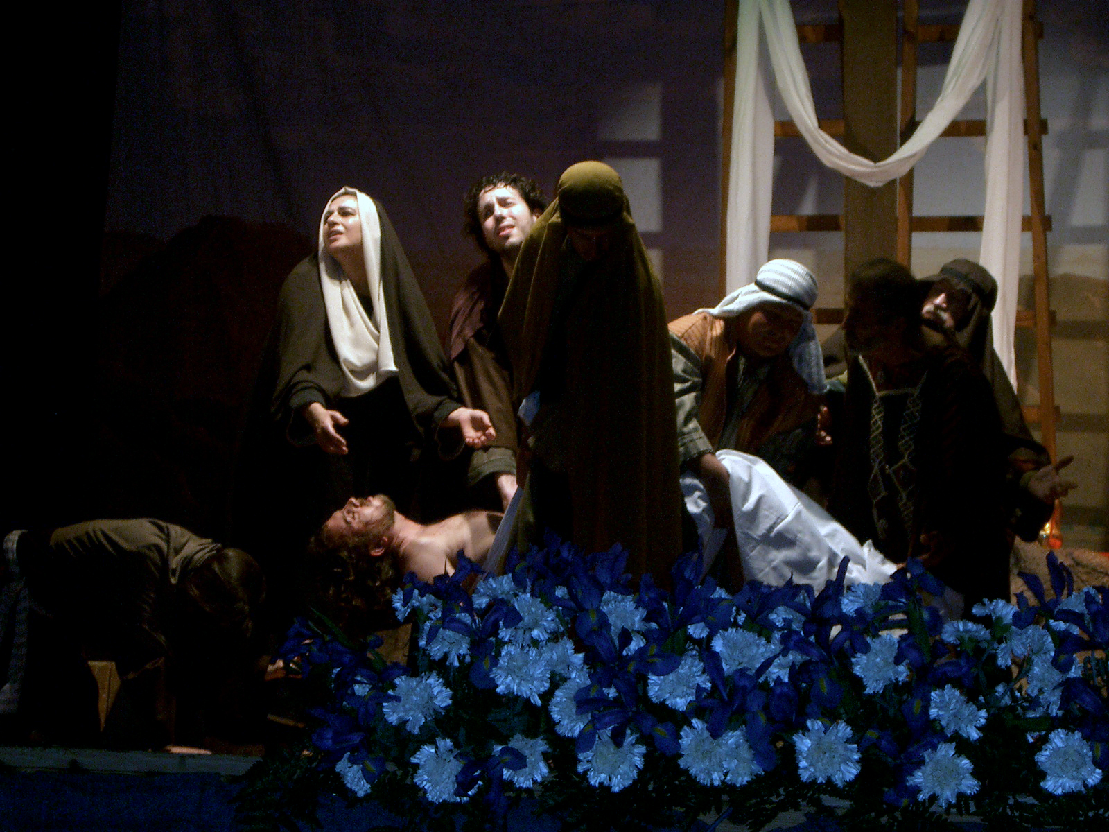 La pasion de callosa